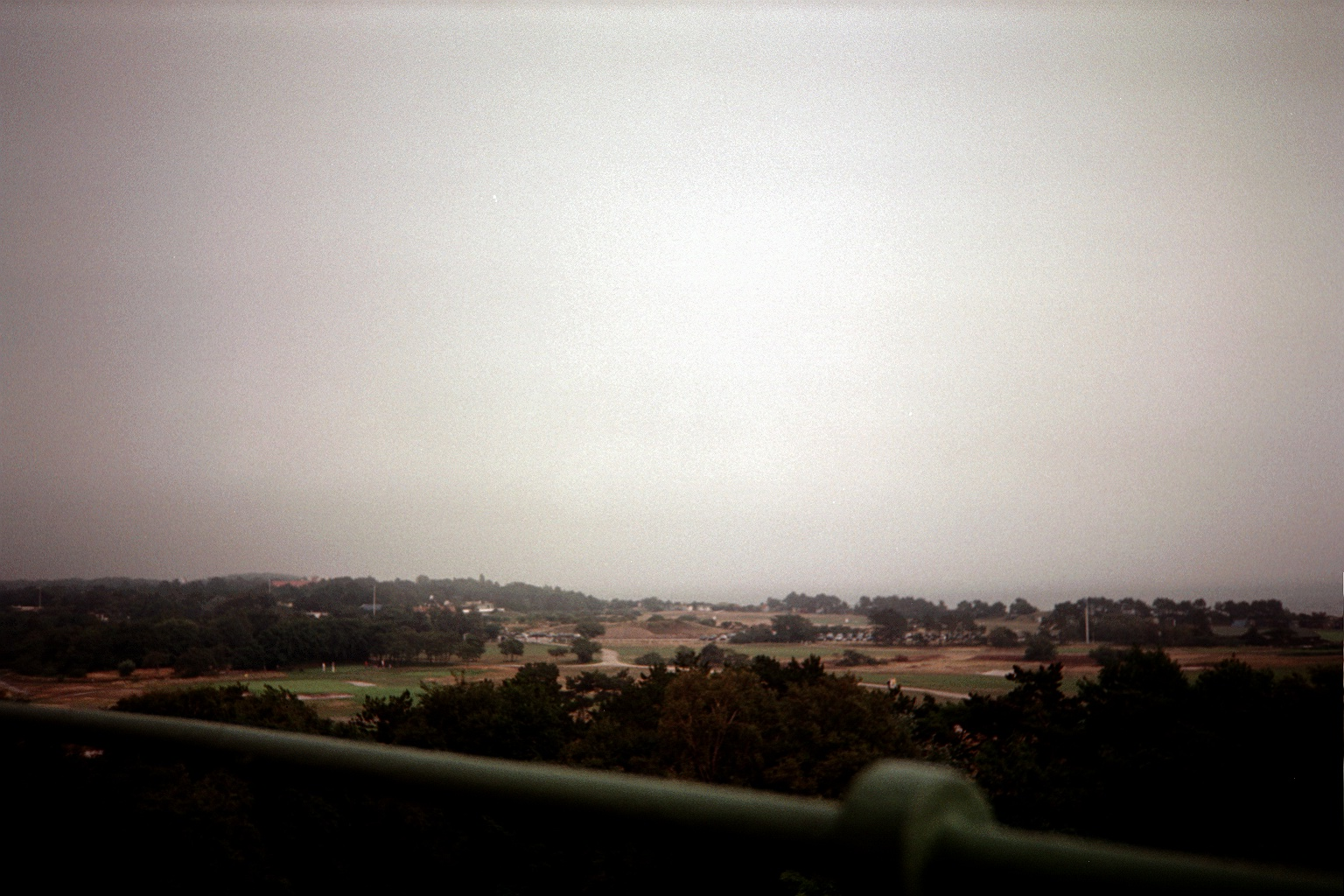 Utsikt från Falsterbo fyr i Falsterbo. Foto: Erkan